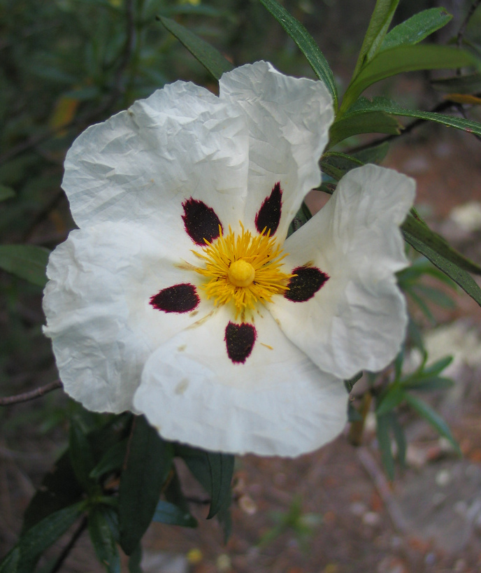 Cistus ladanifer subsp. ladanifer